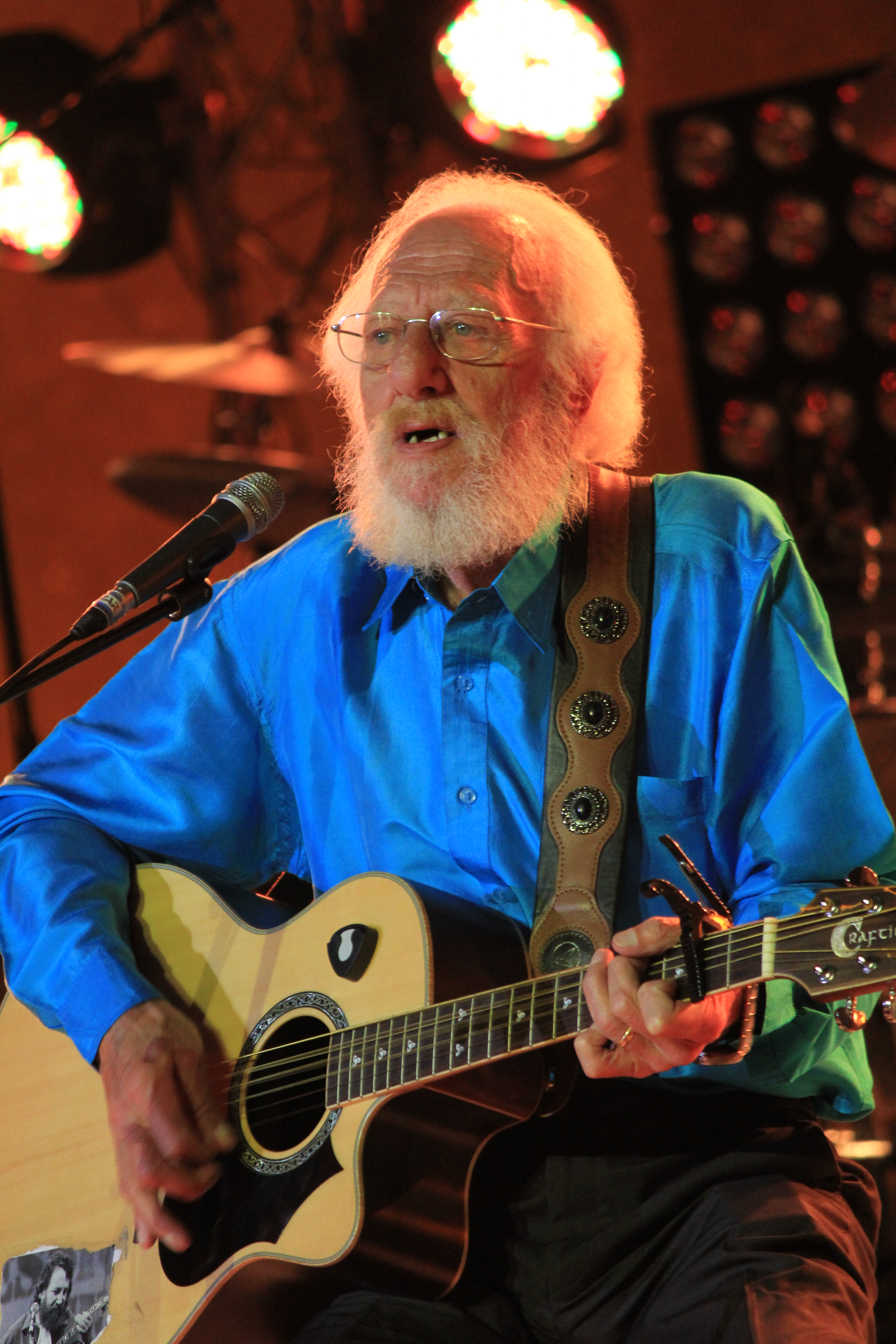 The Dublin Legends en concert au stade du moustoir lors du festival interceltique de Lorient 2014.